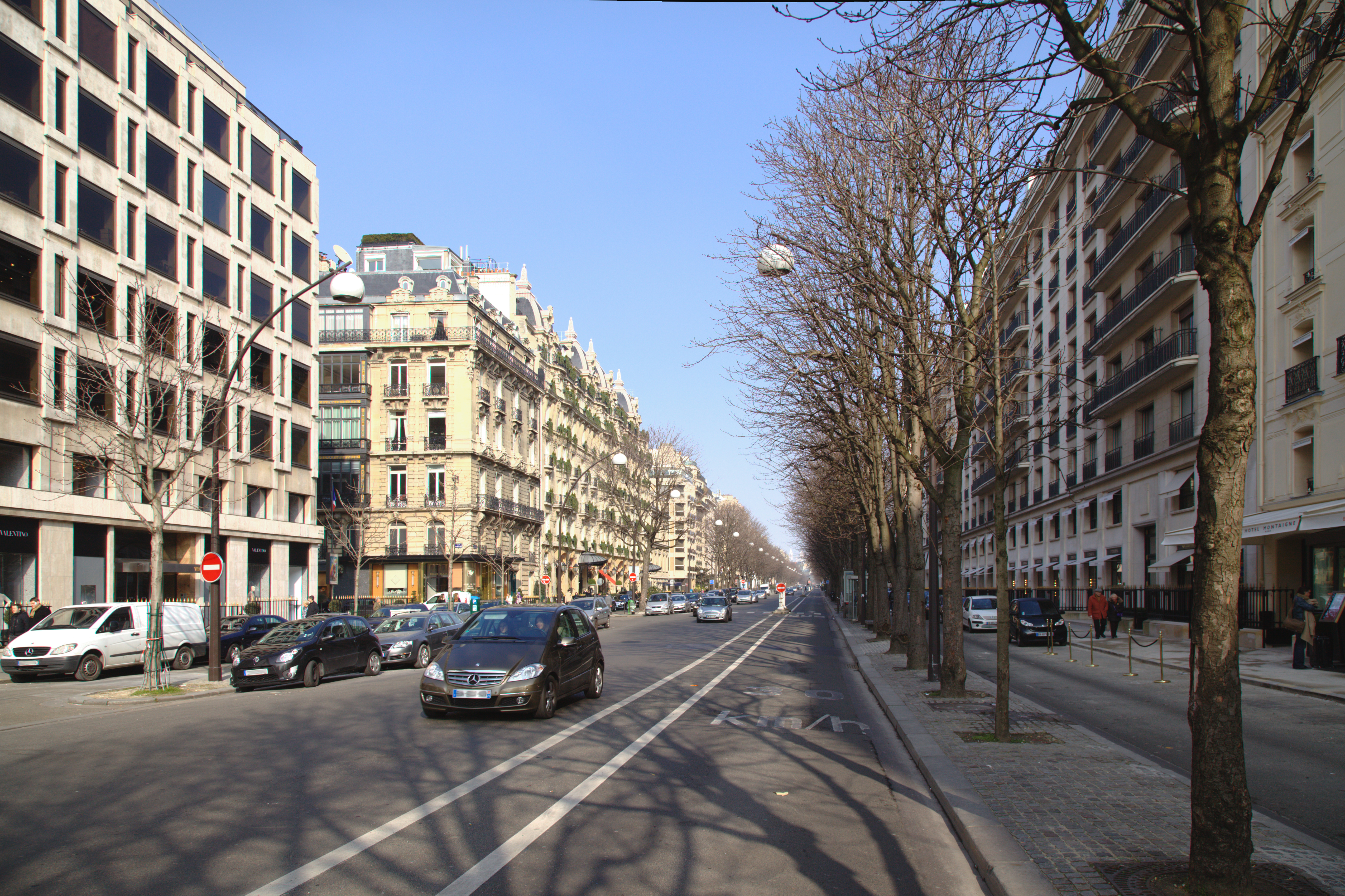 L'avenue Montaige à Paris, vue en direction des Champs Élysées. Au fond à gauche l'hôtel Plaza Athena.